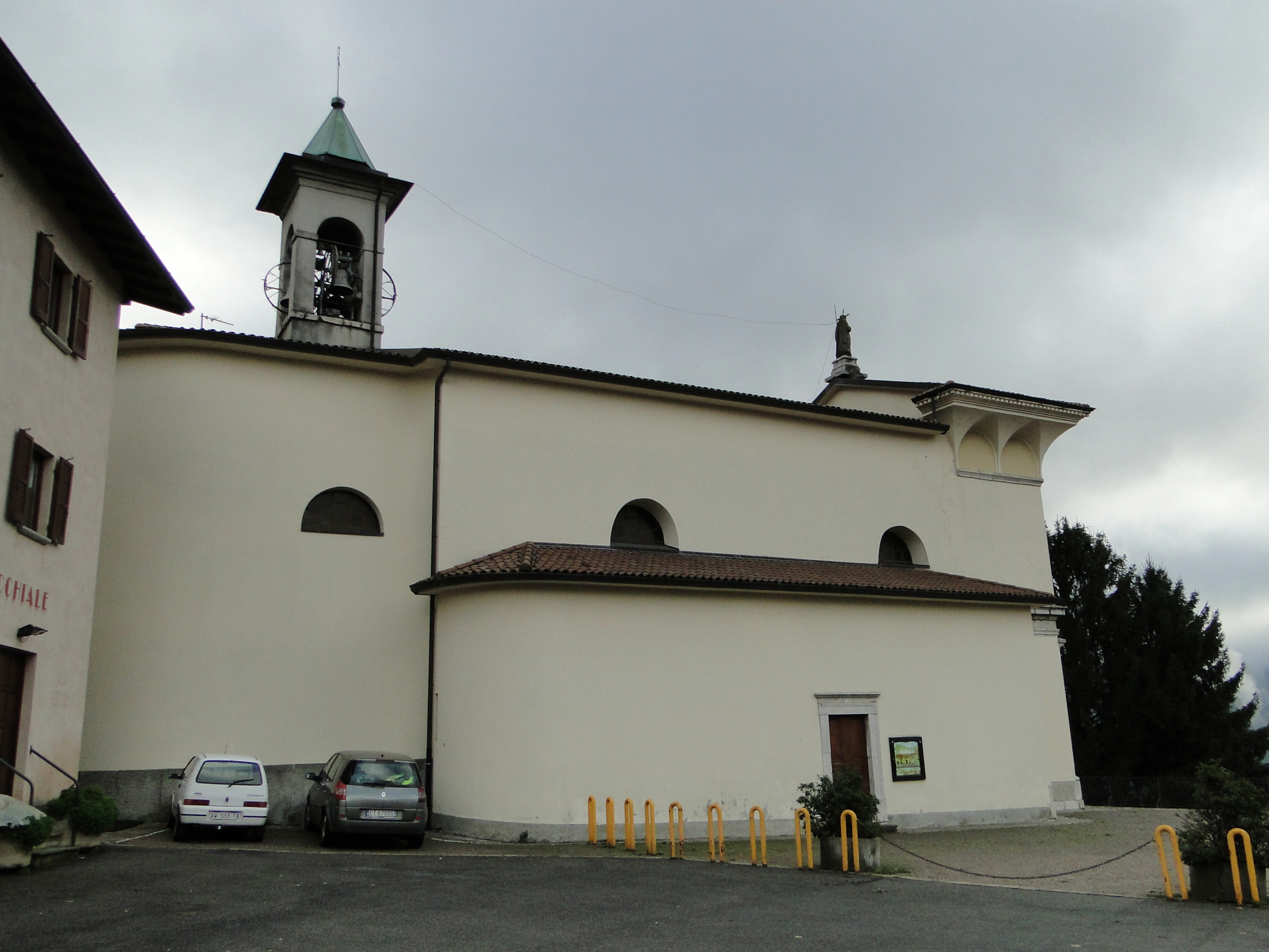 Casale, frazione di Albino (BG). Chiesa parrocchiale del Sacro Cuore